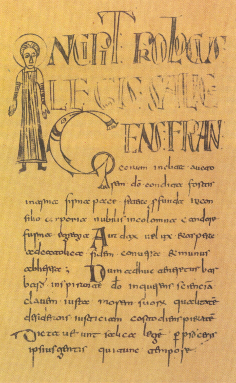 Handschrift der Lex Salica von 793 von Vandalgrius, Standort: Stiftsbibliothek St. Gallen.